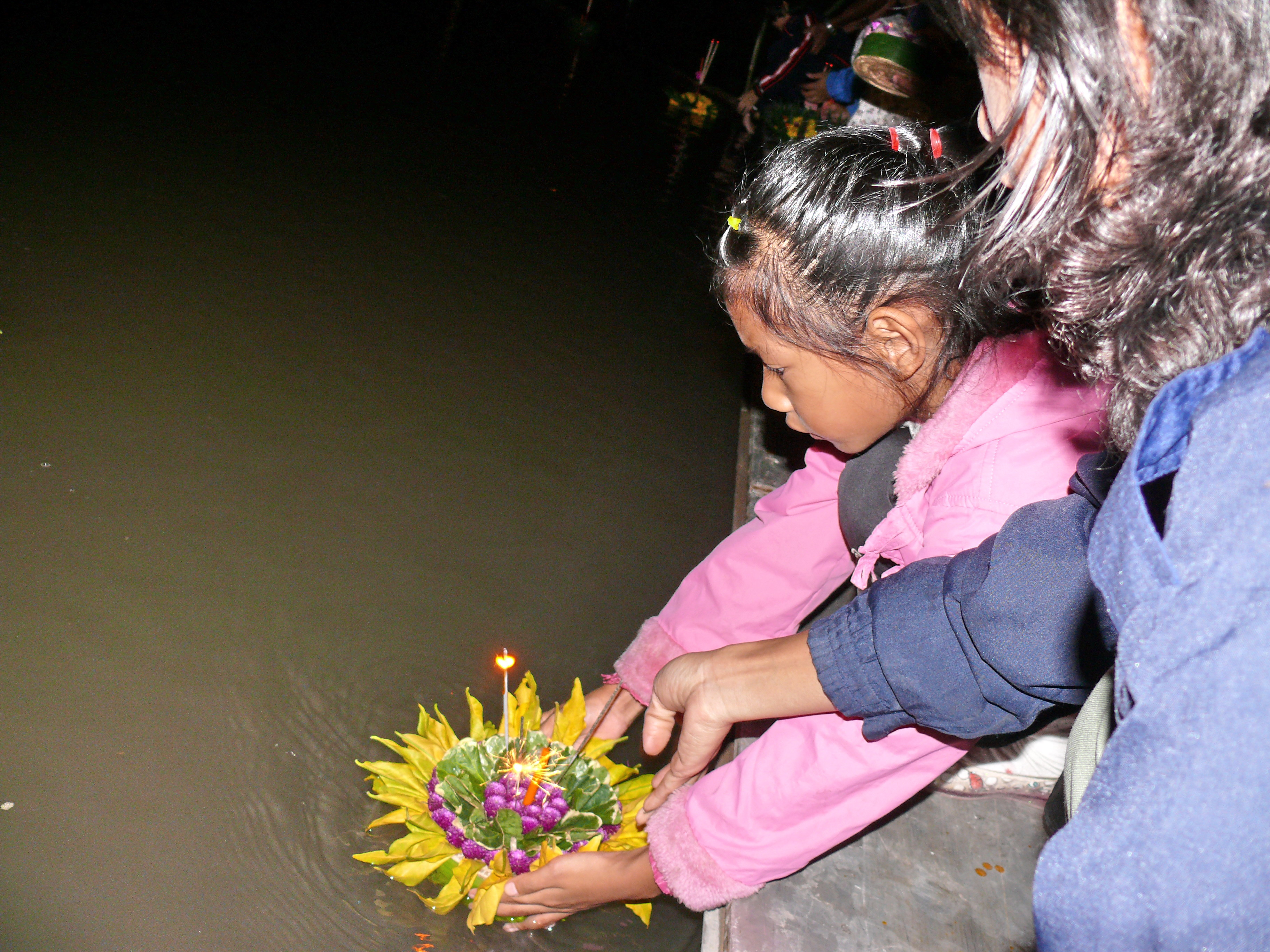 Loy Kratong Nan 24 novembre 2007